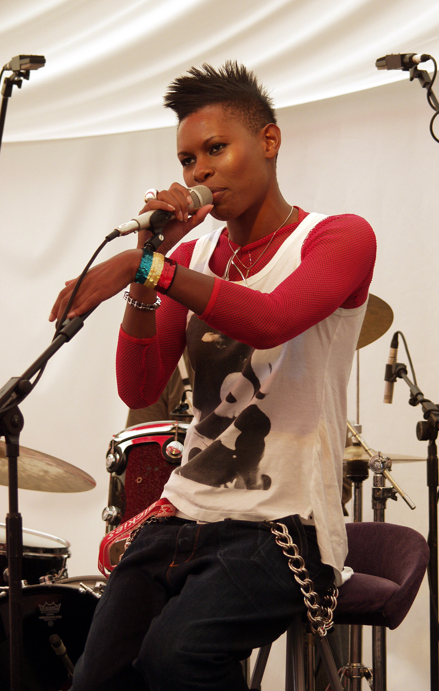 Deborah Anne Dyer aka Skin, former singer of Skunk Anansie